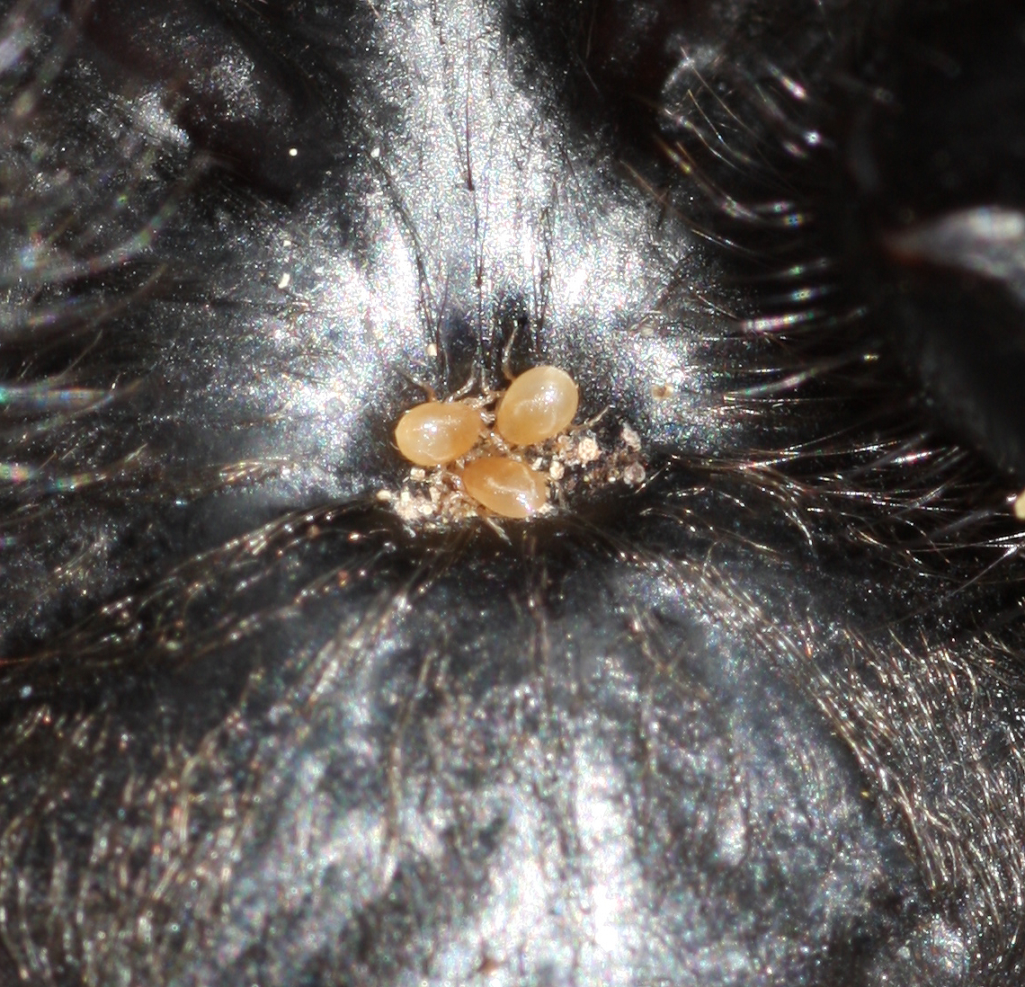 Araña Toro, Acaros del genero Androlaelaps